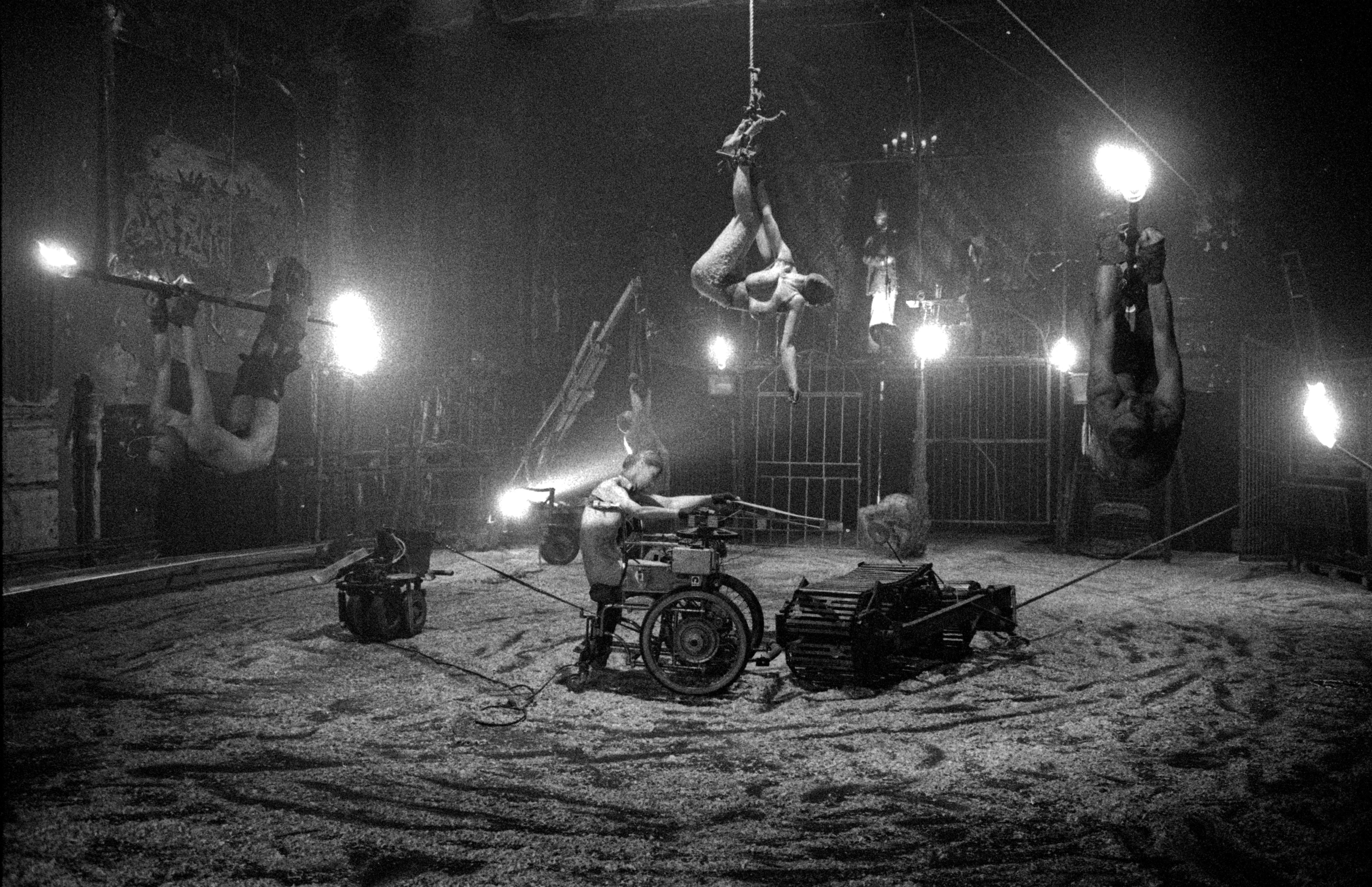 BESTIA PIGRA - RA.M.M. / Photo © Ben de Biel